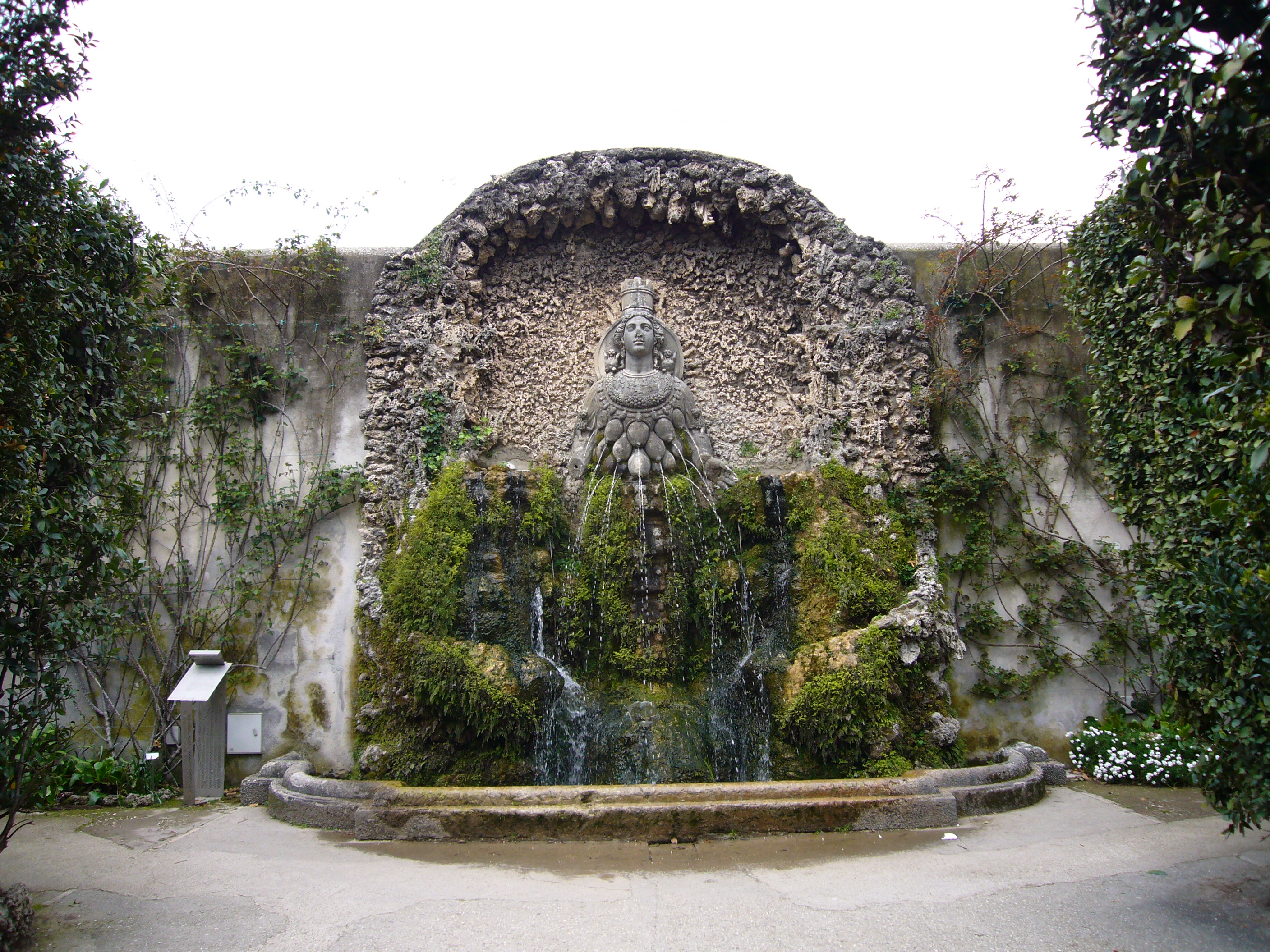 Tivoli, Villa d'Este:fontana di Diana Efesina, detta dell'Abbondanza